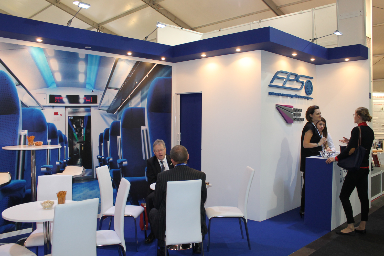 Stoisko Fabryki Pojazdów Szynowych podczas targów Trako 2015. The making of this document was supported by Wikimedia Polska Association, within Wikigrant no. WG 2015-34. English | polski | +/−